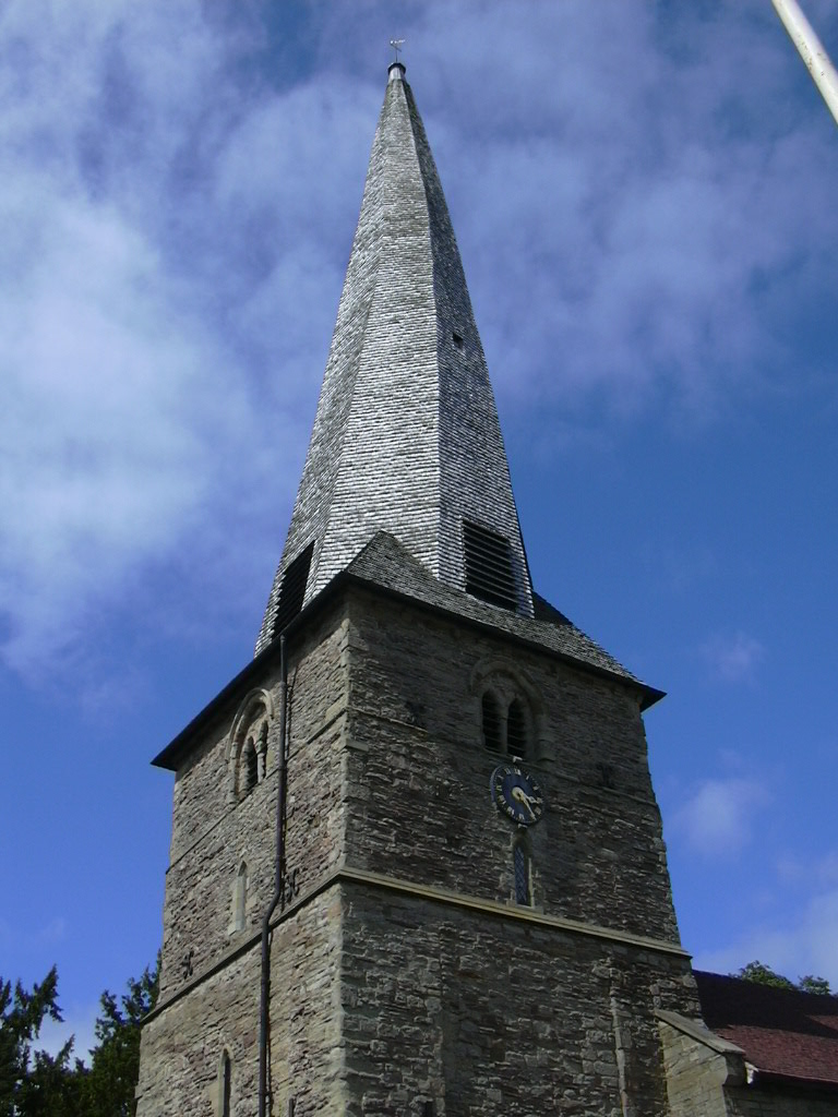 Photographie du clocher tors de Cleobury Mortimer trouvée sous le nom Cleobury_Mortimer_Crooked_Spire.JPG